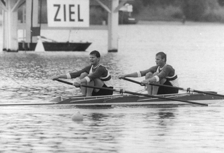 Uwe Neppner, Thomas Lange ADN-ZB Kluge 21.8.85 Brandenburg: Vorschaumotiv zu den Weltmeisterschaften im Rudern vom 26.8. bis 1.9.1985 in Mazewinkel (Belgien)- Ihr Ziel: erfolgreiche Titelverteidigung. Im Doppelzweier gehen die DDR-Meister von 1985 in Brandenburg, Uwe Neppner-Thomas Lange (SC Chemie Halle-Zielfoto aus Brandenburg), an den Start.